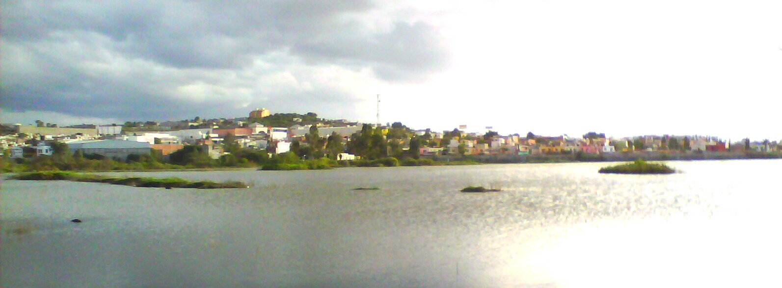 Panoramica de San juan del rio desde el Bordo juarez, donde se aprecia Plaza Soriana